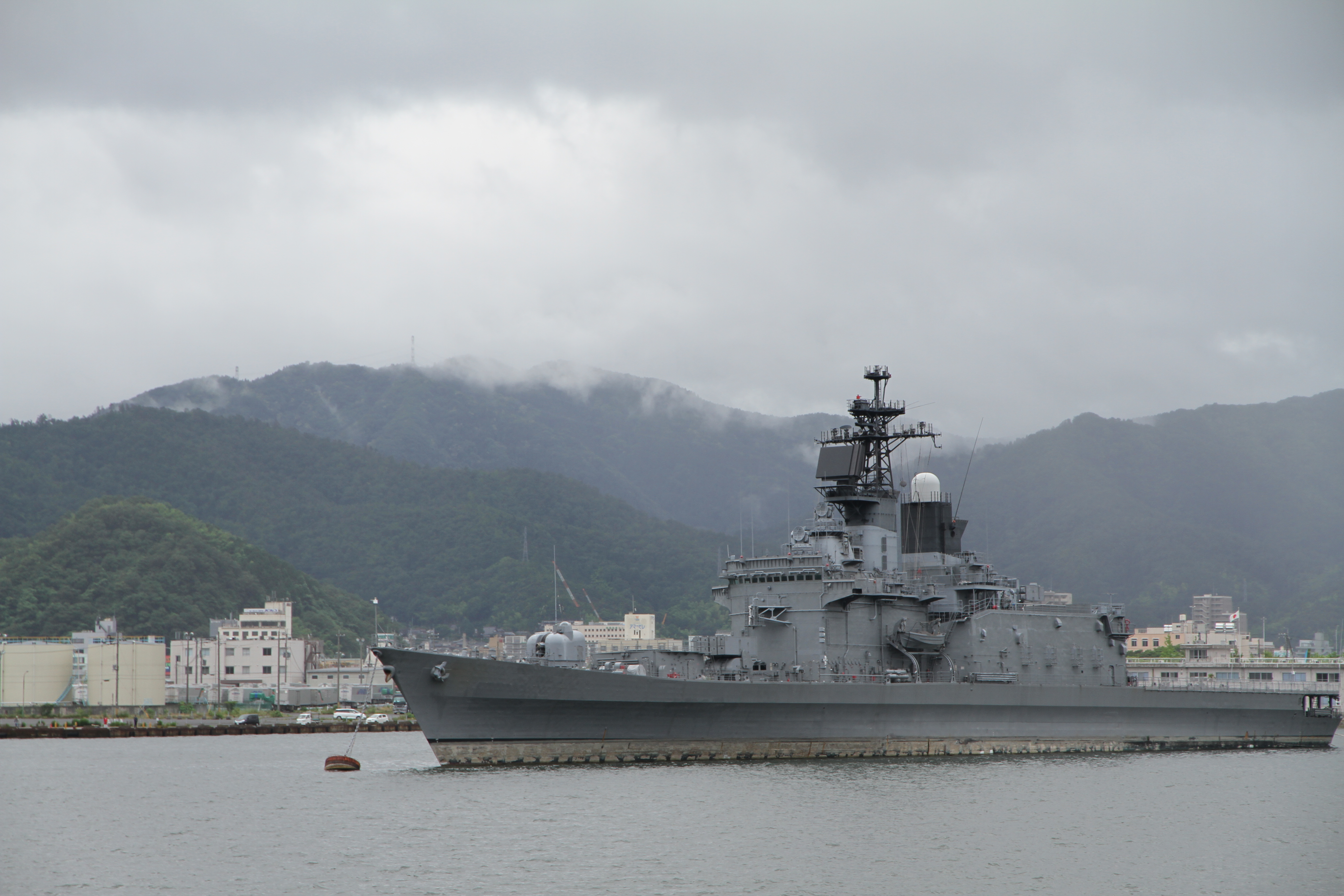 舞鶴基地 護衛艦ふゆづきより